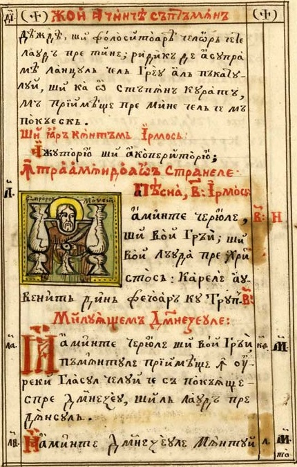 Miniatură din Eclisiiârh de Procopie (Picu) Pătruț (1856)